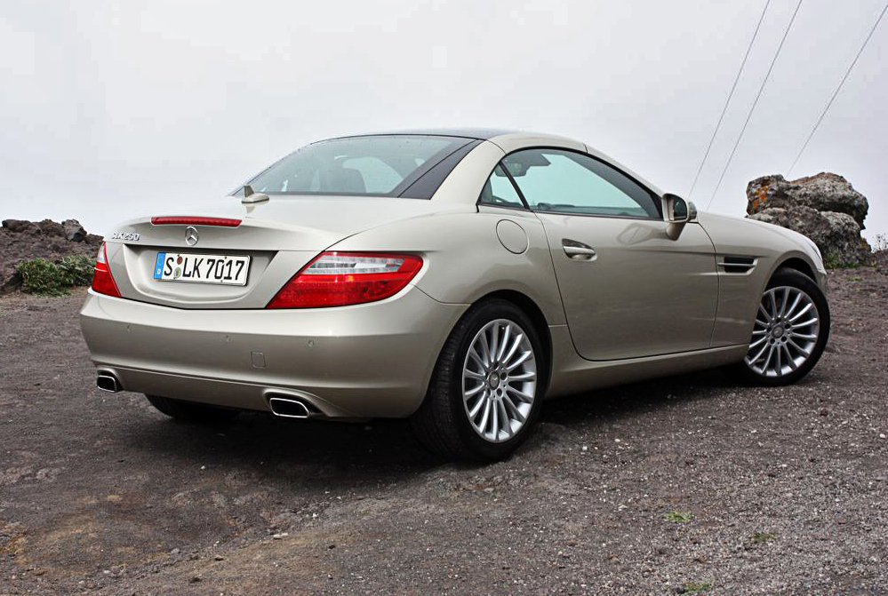 Mercedes-Benz SLK 250 BlueEFFICIENCY (R 172)